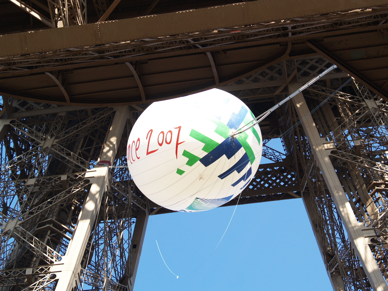 Coupe du Monde de Rugby 2007